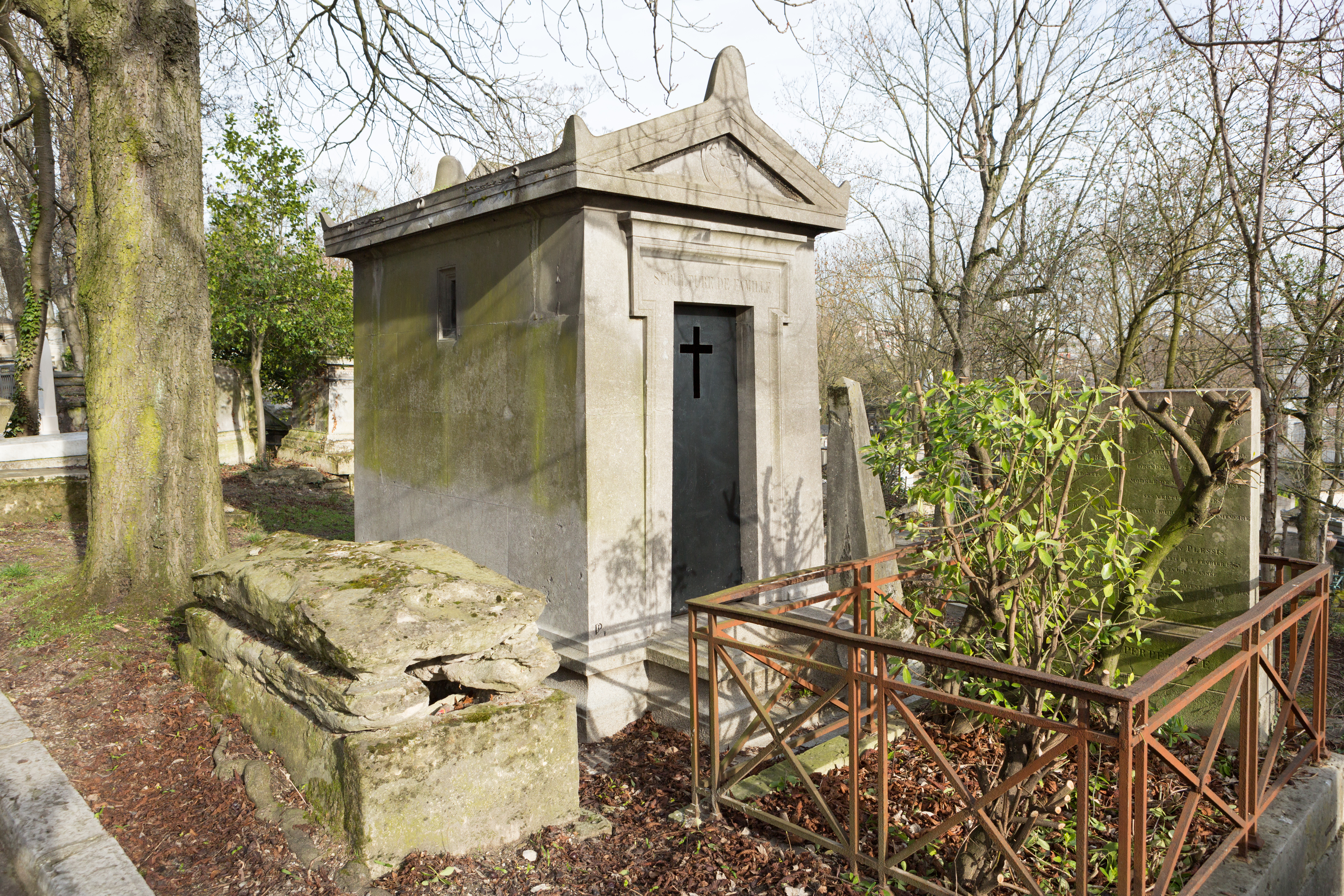 Sépulture de Lucy Arbell, née Georgette Gall (1878-1947), cantatrice et artiste lyrique mezzo-soprano française .